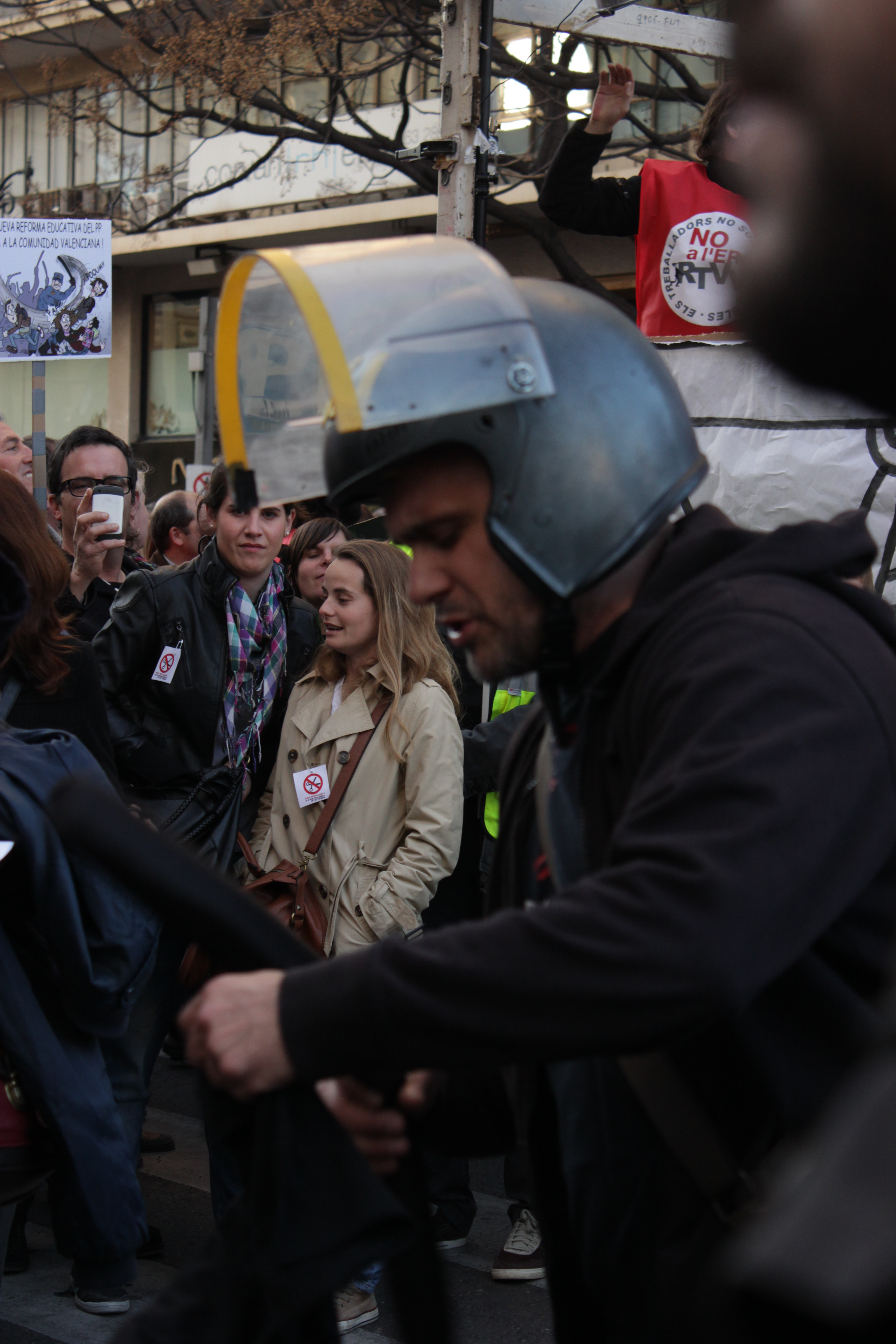 Manifestació contra les retallades de la GVA - 25 de febrer de 2012. Xavi Castillo vestit d'agent antiavalot.